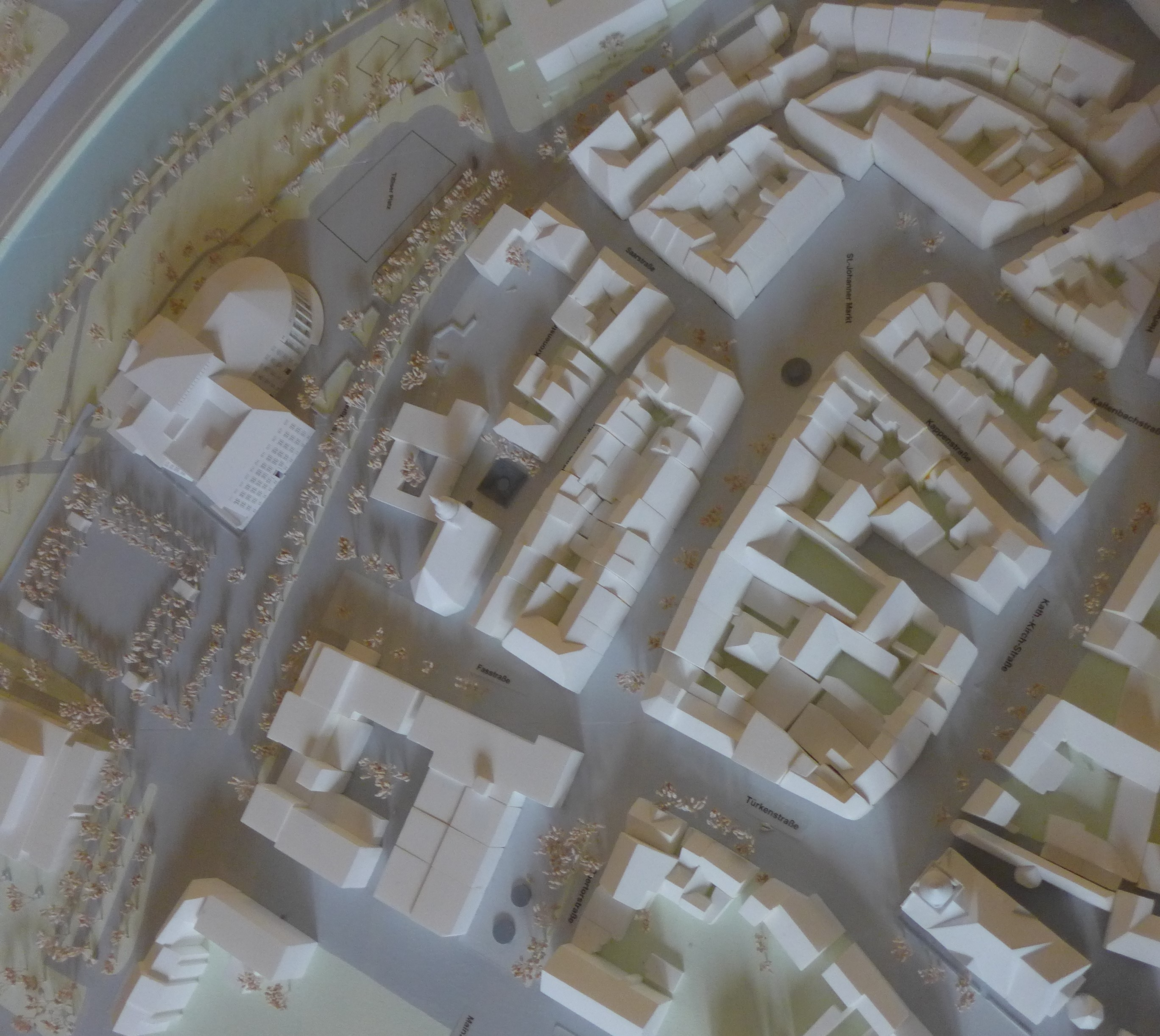 St. Johanner Markt, Stadtmodell Saarbrücken (Rathaus St. Johann)